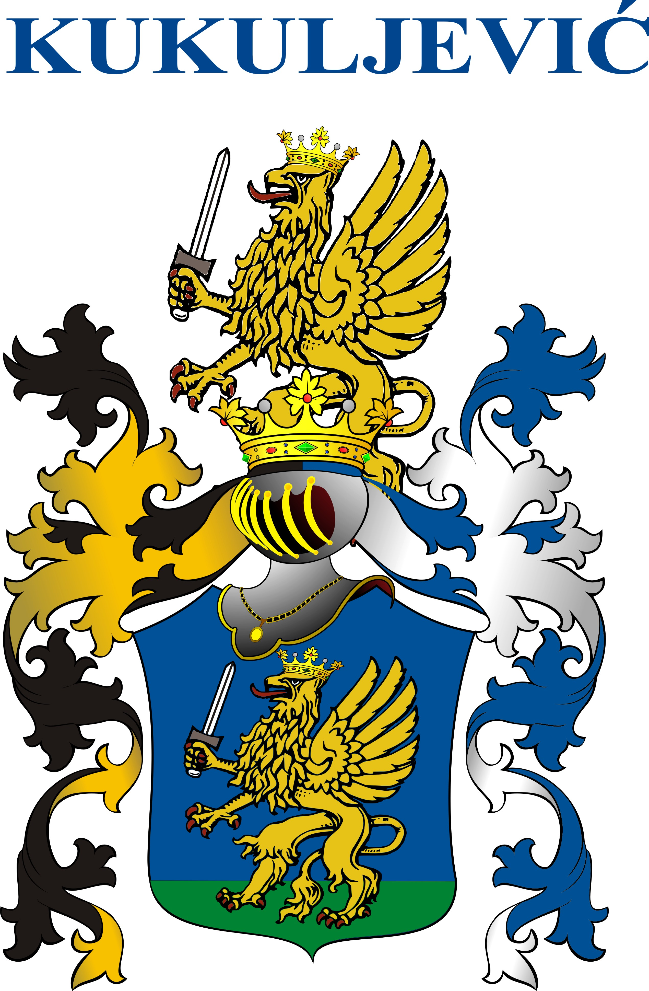 Grb obitelji Kukuljević prema grbovnici od 09.12.1649.